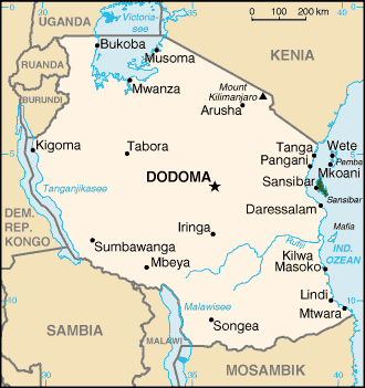 Karte von Tansania (editiert)